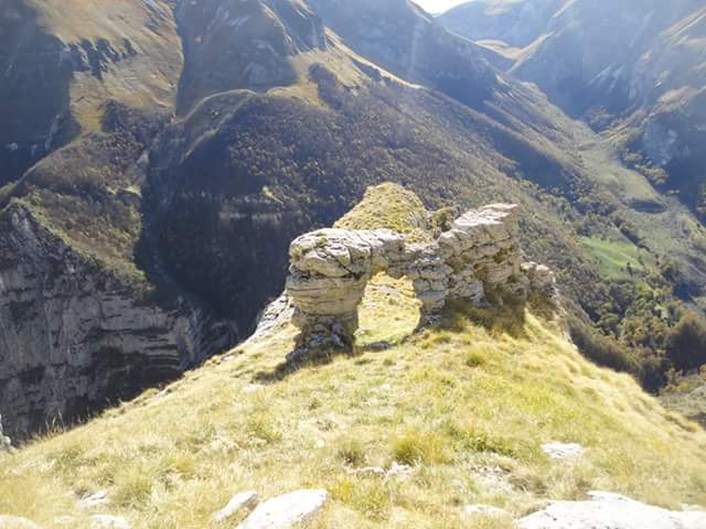 Tempio della Sibilla, Monte Priora, Monti Sibillini